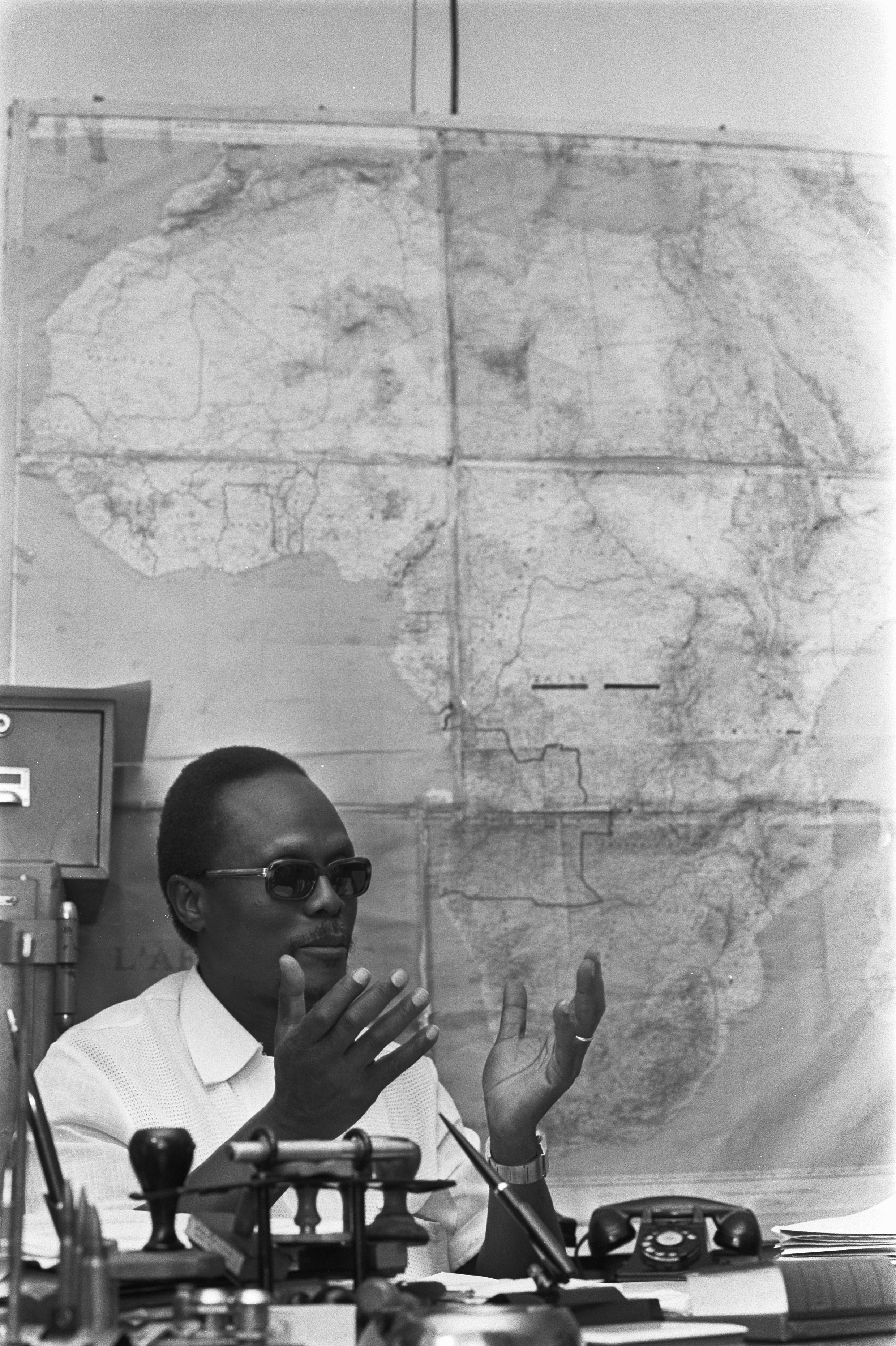 Holden Roberto, president van de GRAE, de regering in ballingschap van de Angolese bevrijdingsbeweging FNLA in Zaïre Datum 24 oktober 1973